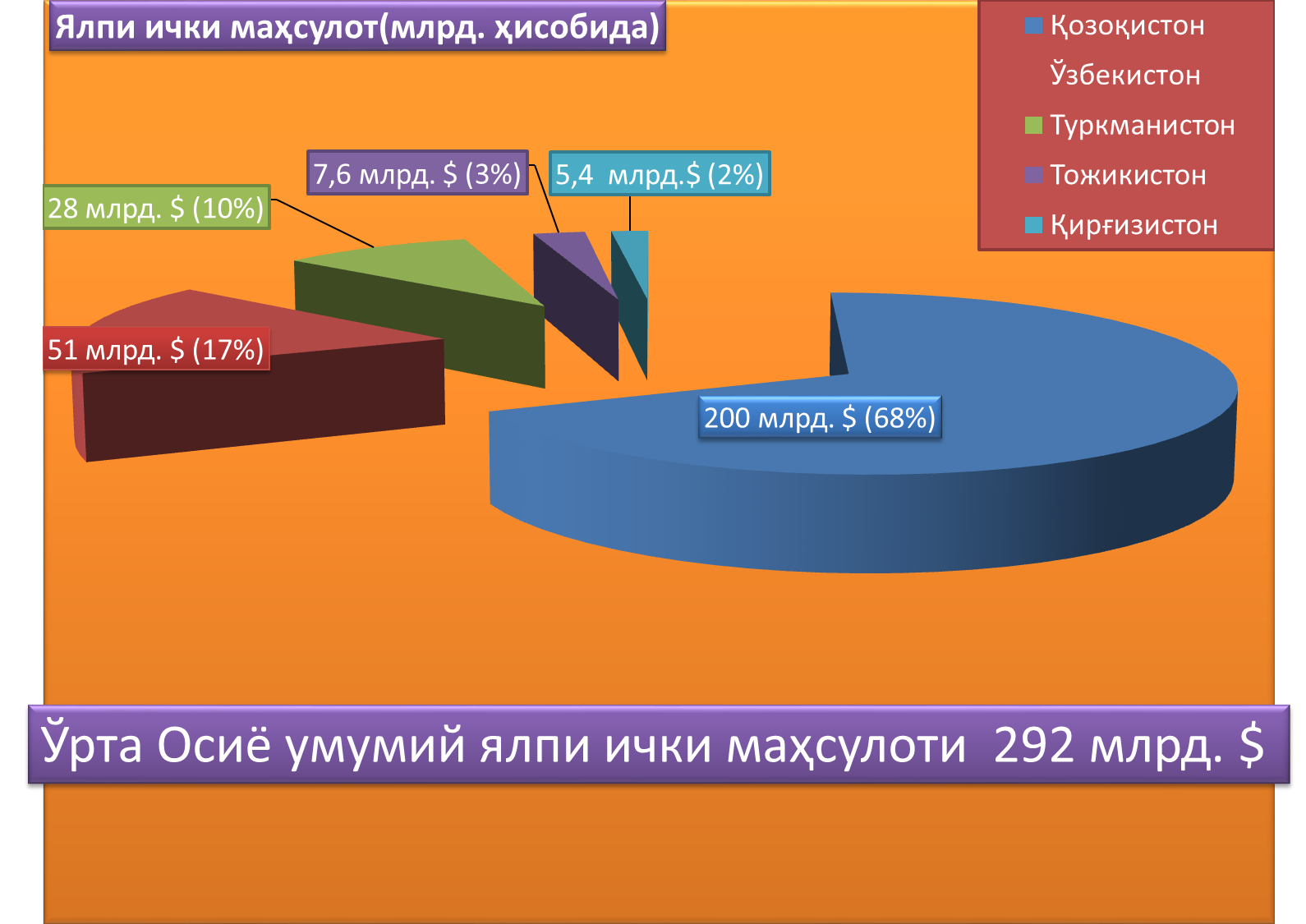 Oʻzbekcha/ўзбекча: Ўрта Осиё умумий ялпи ички маҳсулоти